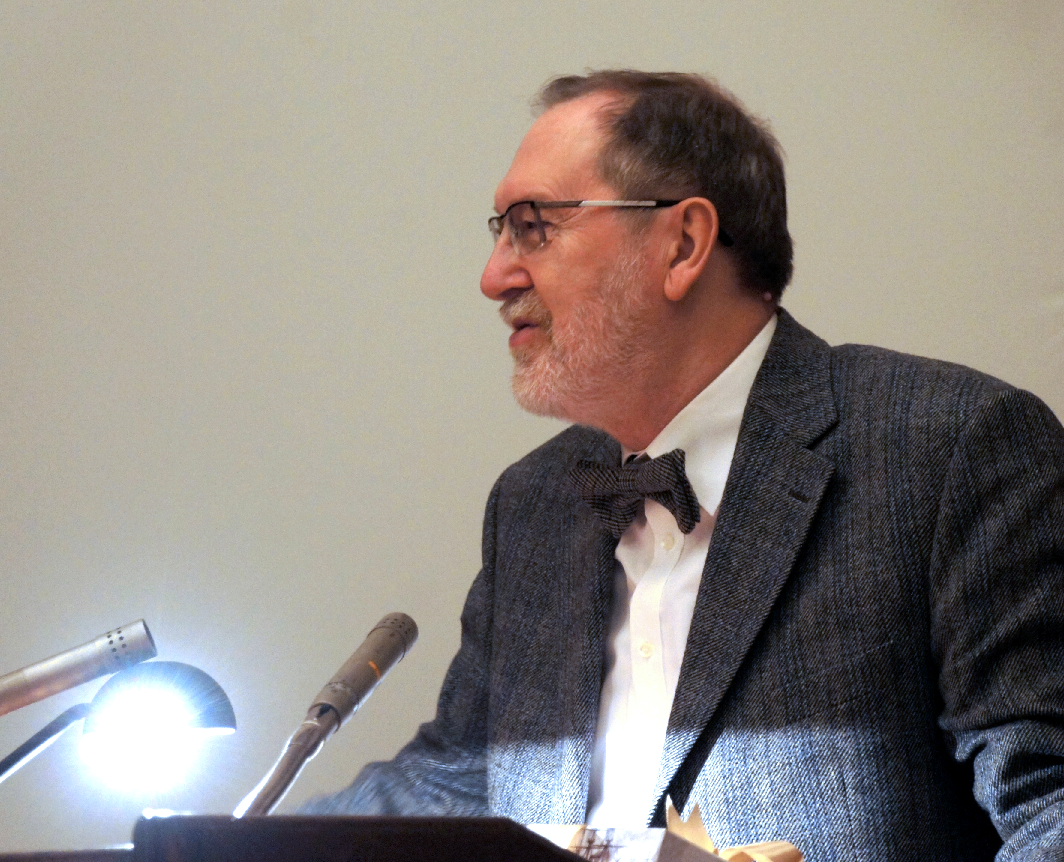 Выступление Игоря Гертрудовича Печенкина в президиуме РАН, на 300-летии Минералогического музея им. А. Е. Ферсмана РАН, 2016.